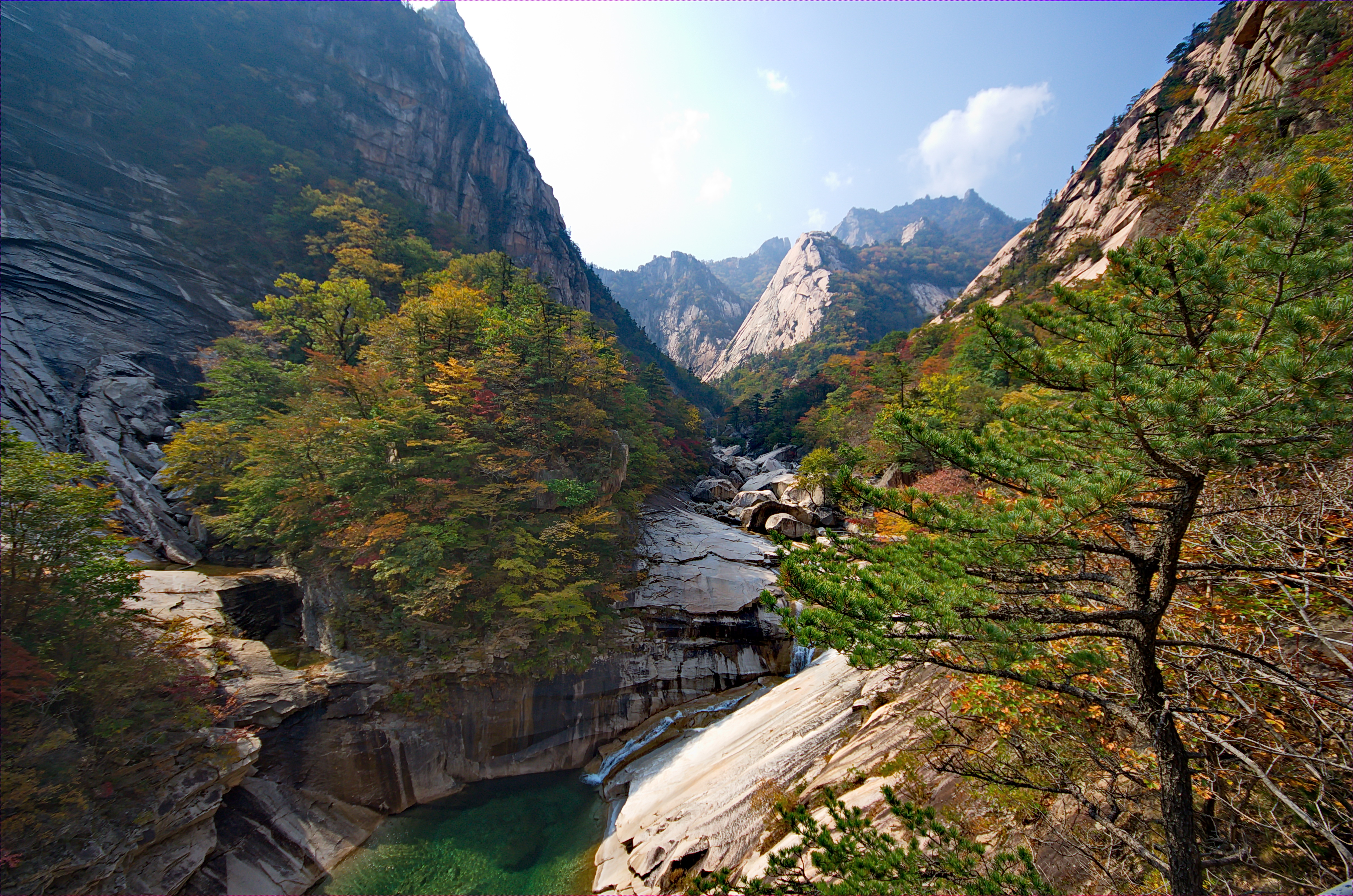 Nordkorea 2015 - Kumgang Gebirge